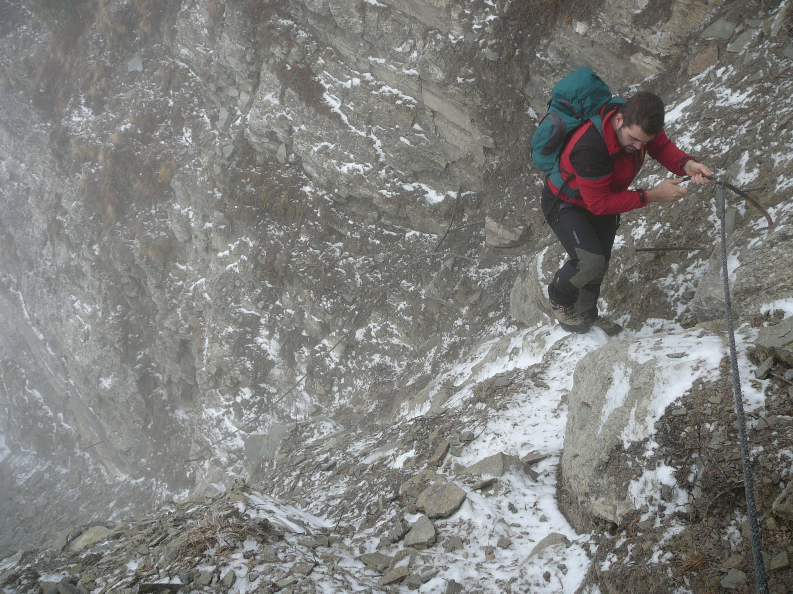 Primo tratto atrezzato alta via GM